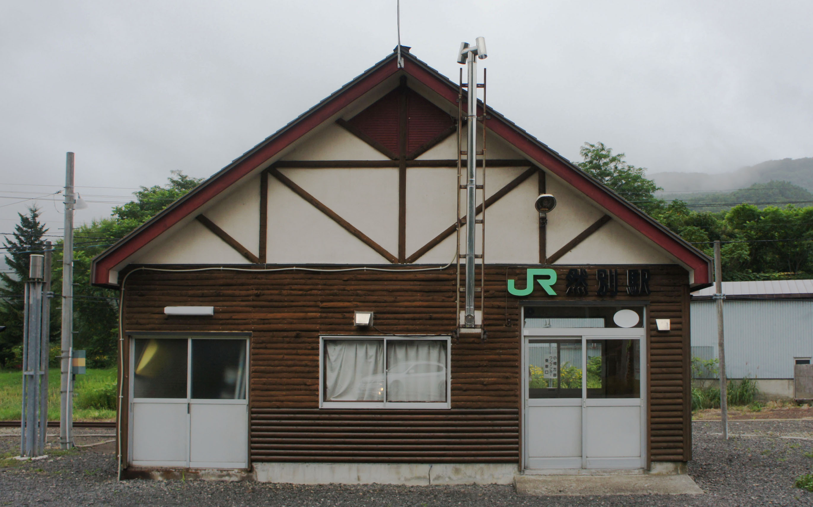 JR函館本線・然別駅の駅舎